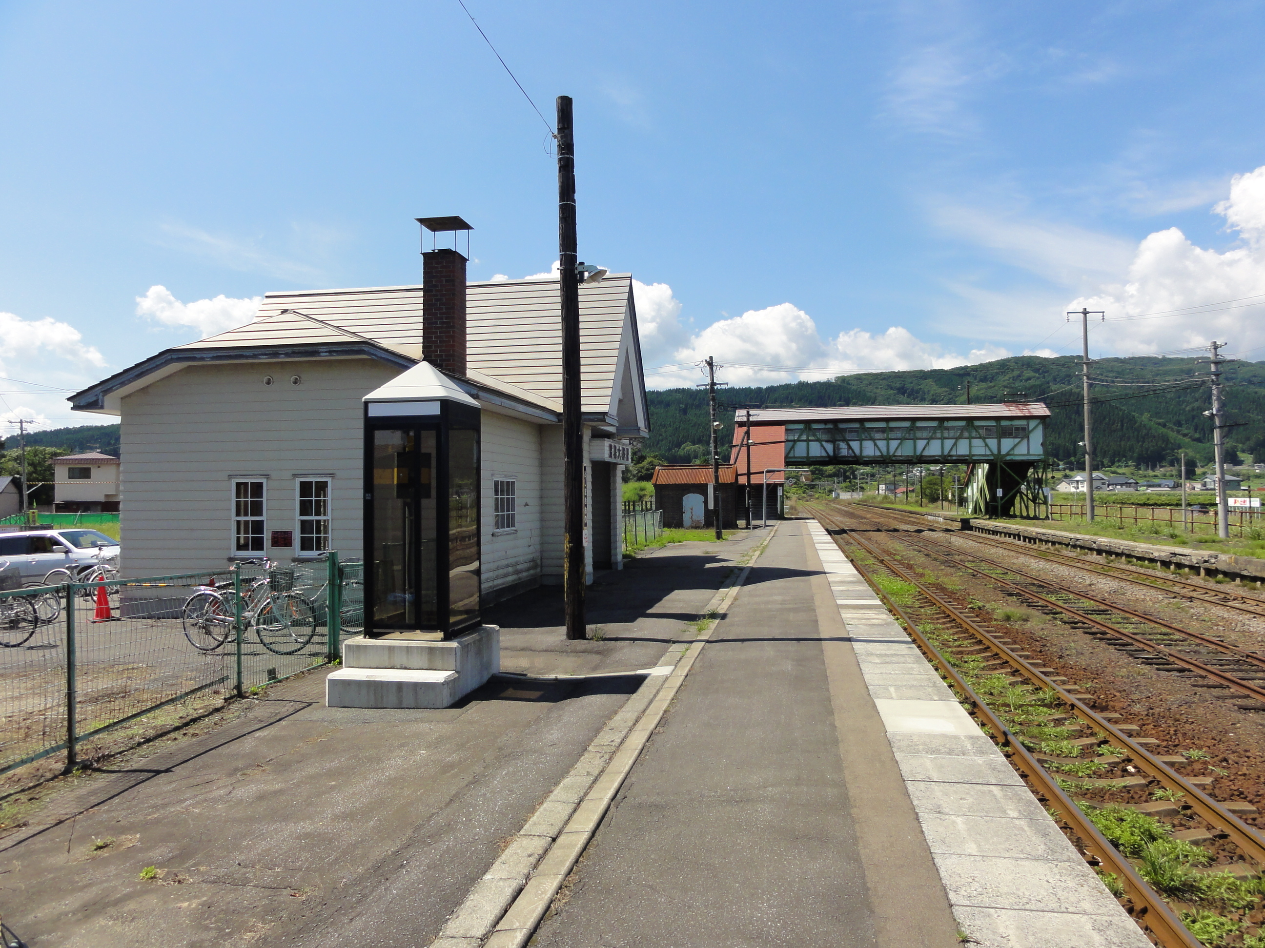 渡島大野駅ホーム